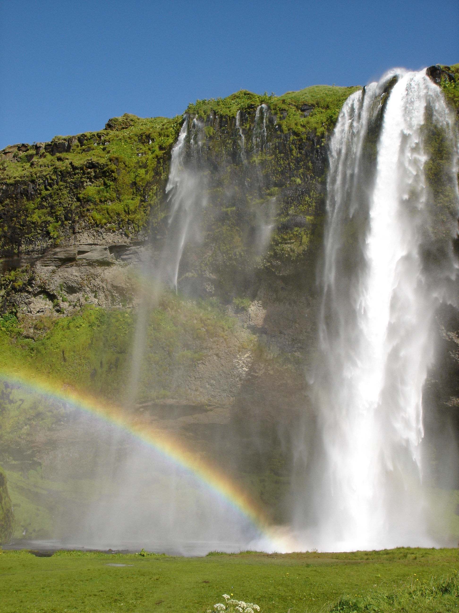 Little Frank 2006, foto scattata nell'agosto 2006